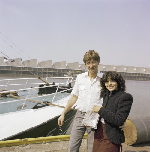 De Marokkaanse zangeres Samira Bensaïd tijdens een fotosessie voor het Eurovisie Songfestival 1980